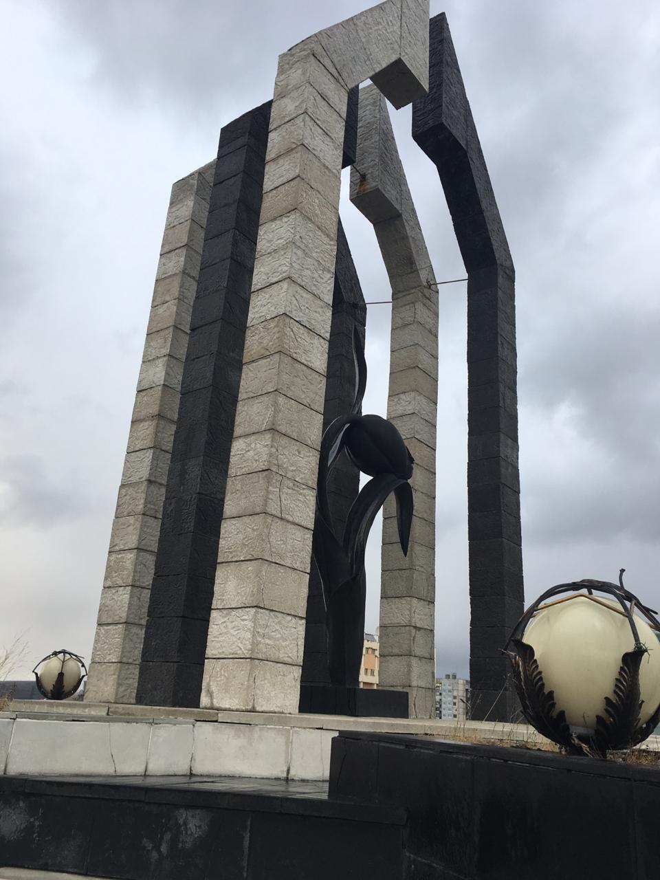 «Черный тюльпан»: Комсомольская, Норильск, Центральный, Красноярский край